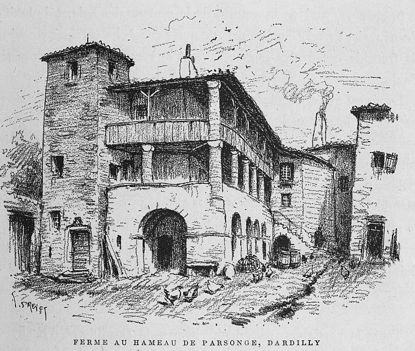 Aux environs de Lyon / Monsieur Josse ; préface de M. Coste-Labaume ; édition illustrée de 250 dessins de J. Drevet.